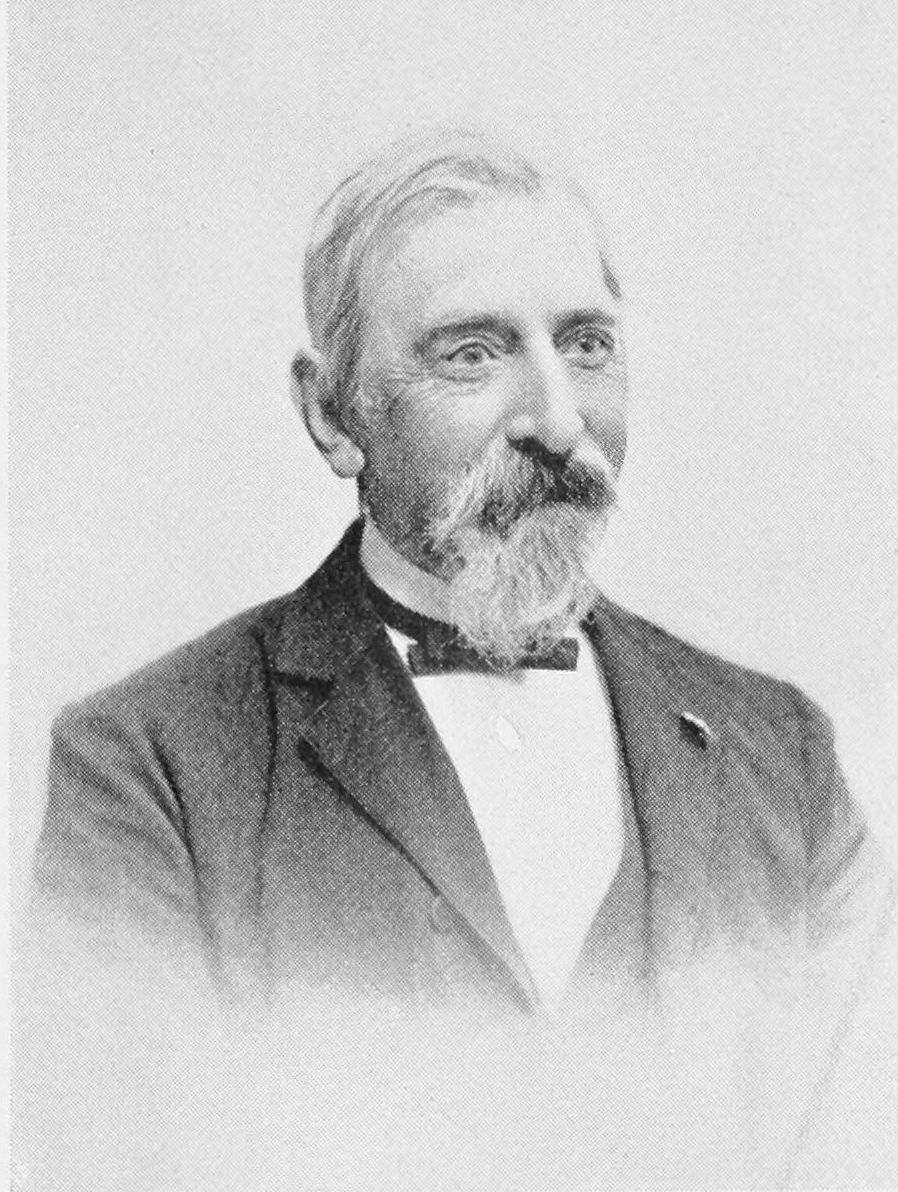 A P Madsen